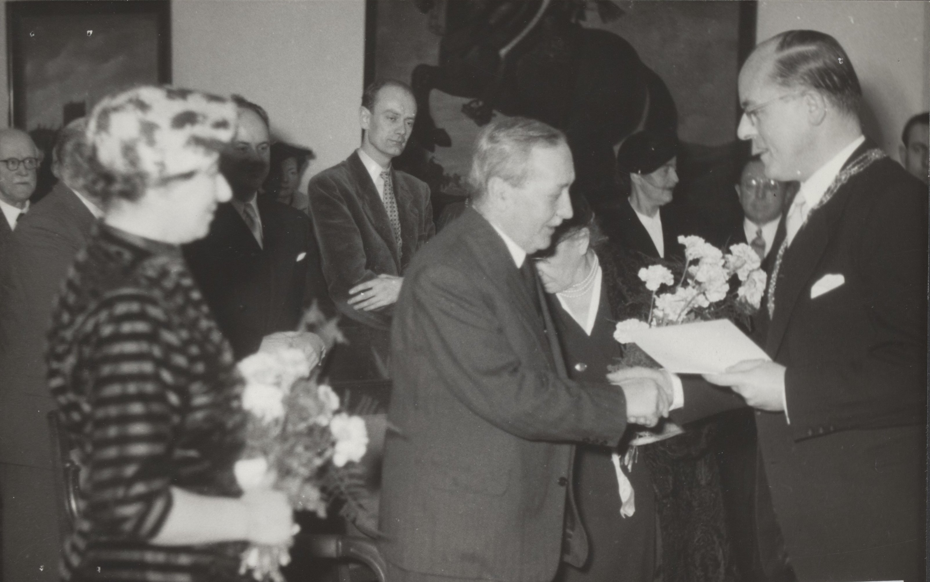 Uitreiking prijzen Jan Campert-stichting. Links: Josepha Mendels (Vijverbergprijs, fl. 1.500) , midden: Willem Elsschot (Constantijn Huygensprijs, fl. 2.000), recht: burgemeester Frans Schokking, 18 december 1951, Den Haag.